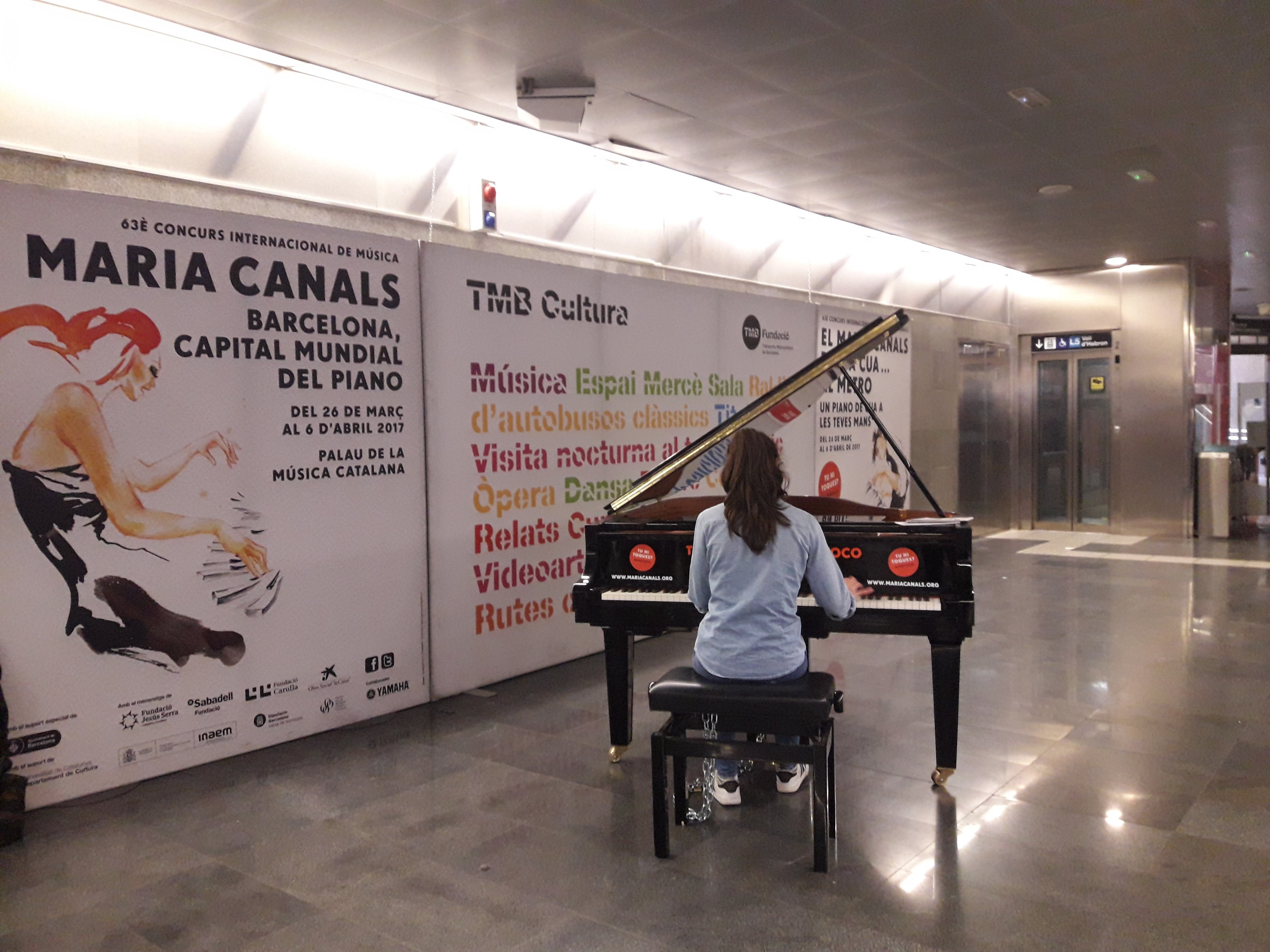 63è Concurs Internacional de Música Maria Canals. Barcelona, 2017.